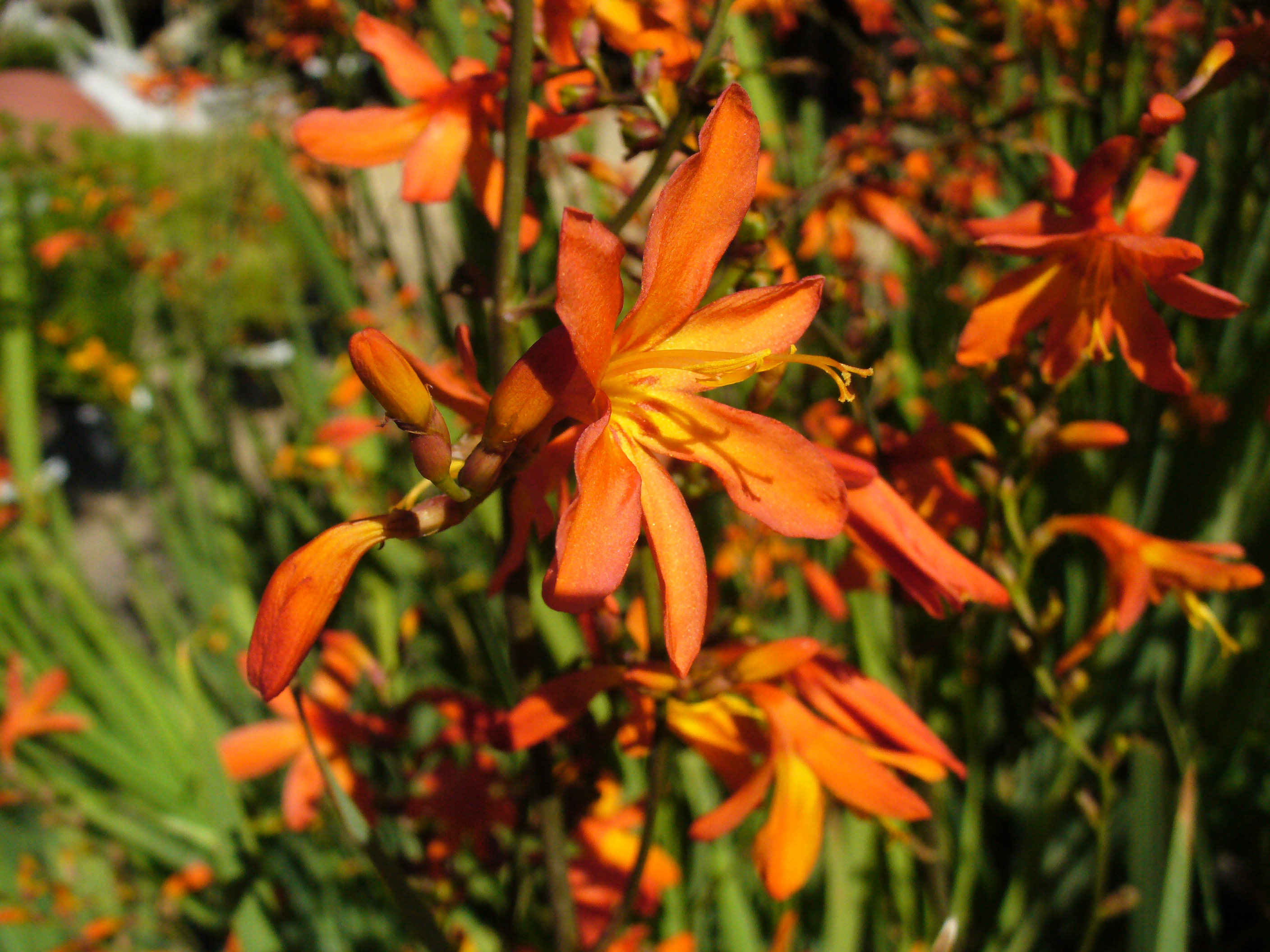 Crocosmia aurea flower